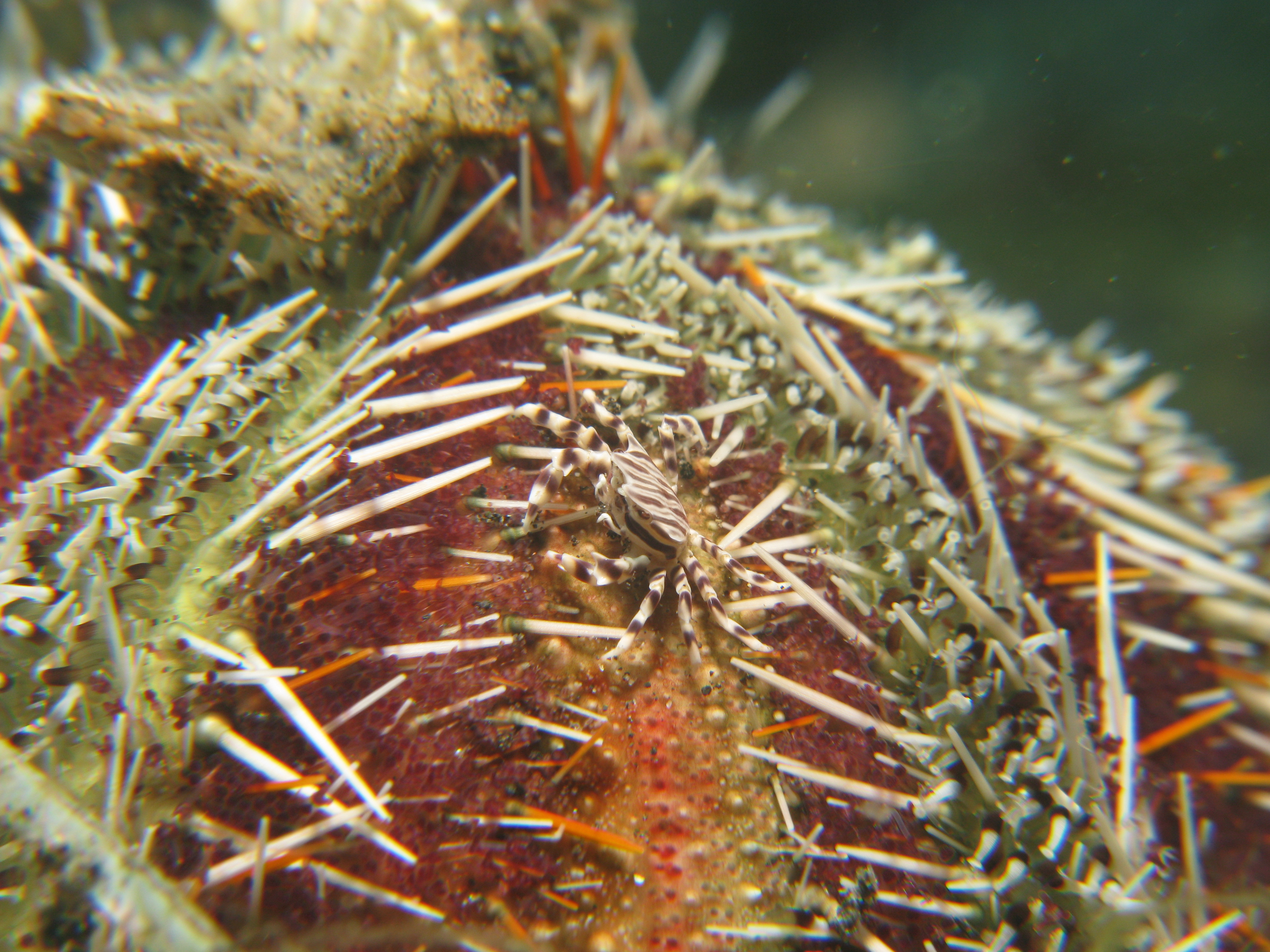 Commensal crab (Zebrida adamsii) on a collector sea urchin (Tripneustes gratilla).